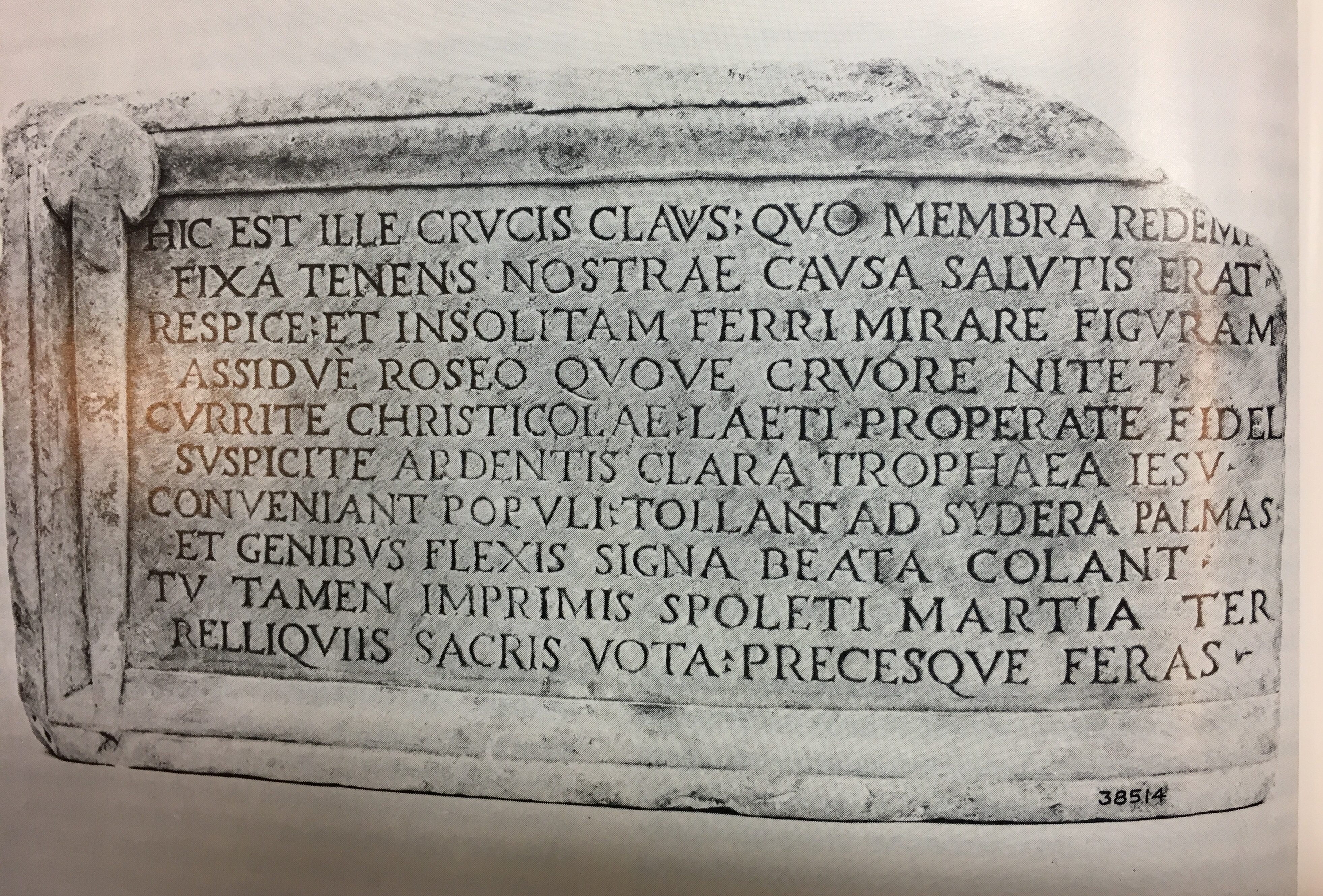 Iscrizione incisa in distici latini in una lastra di marmo 290 x 570 cm. Lo spessore varia da 51 a 75 mm. Databile alla fine del '400. Era murata nella chiesa di San Domenico di Spoleto prima del rinnovamento seicentesco